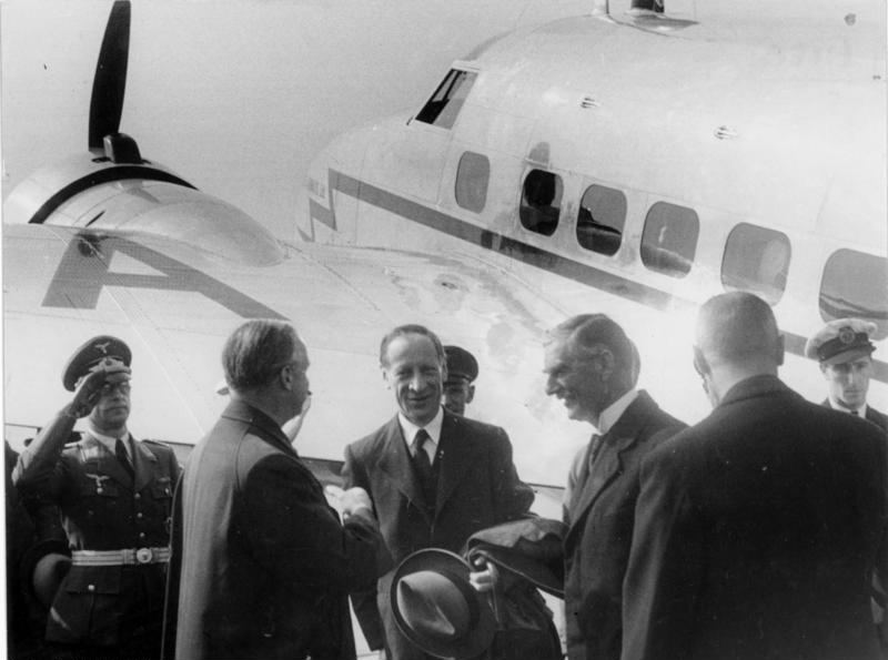 Zentralbild / Archiv Der zweite Besuch des britischen Ministerpräsidenten Chamberlain in Deutschland zu den Vorverhandlungen zum Münchener Abkommen, das die Annexion der Tschecheslowakai besiegeln sollte. UBz: Reichsaussenminister Joachim von Ribbentrop begrüßt am 22.9.1938 den englischen Gast auf dem Kölner Flughafen um ihn nach Godesberg zu begleiten. 12571-38 [Scherl Bilderdienst]